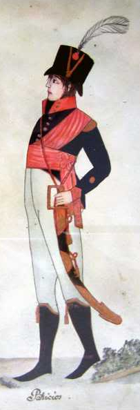 Uniforme de oficial del Regimiento de Patricios